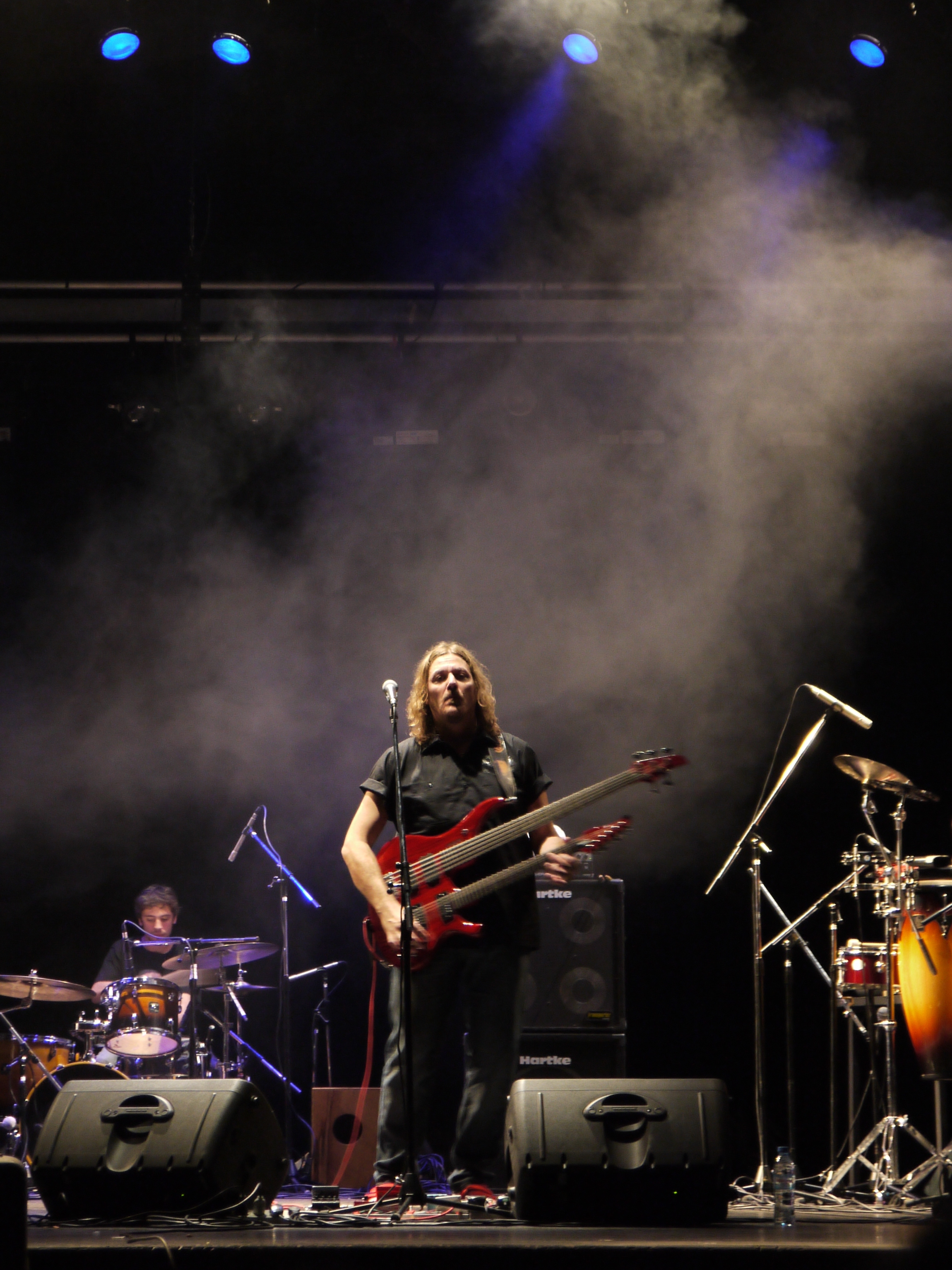 Javier Malosetti durante un concierto del ciclo "Cultura da la Nota", organizado por la Secretaría de Cultura de Salta